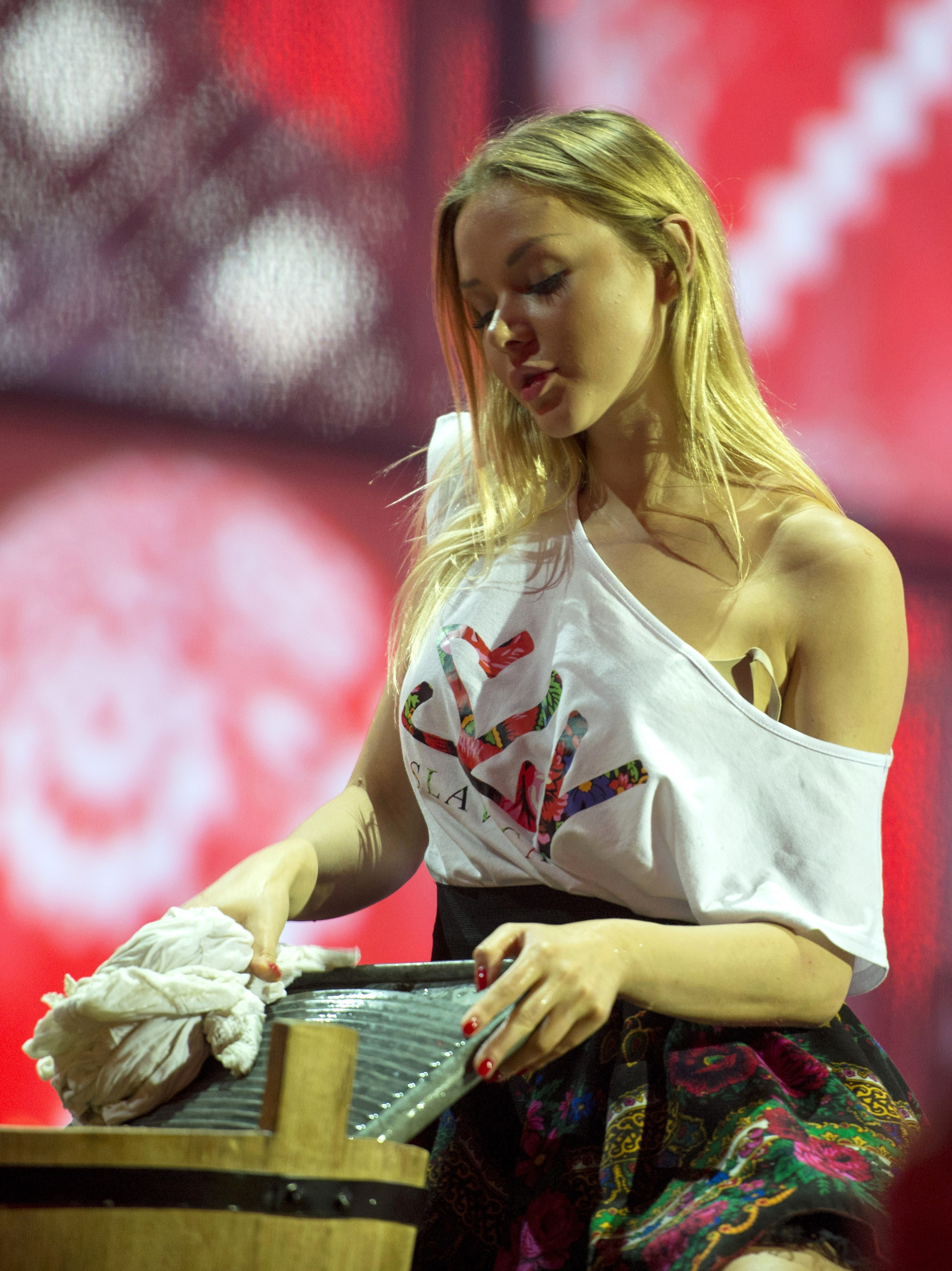 Aleksandra Ciupa, modelka.